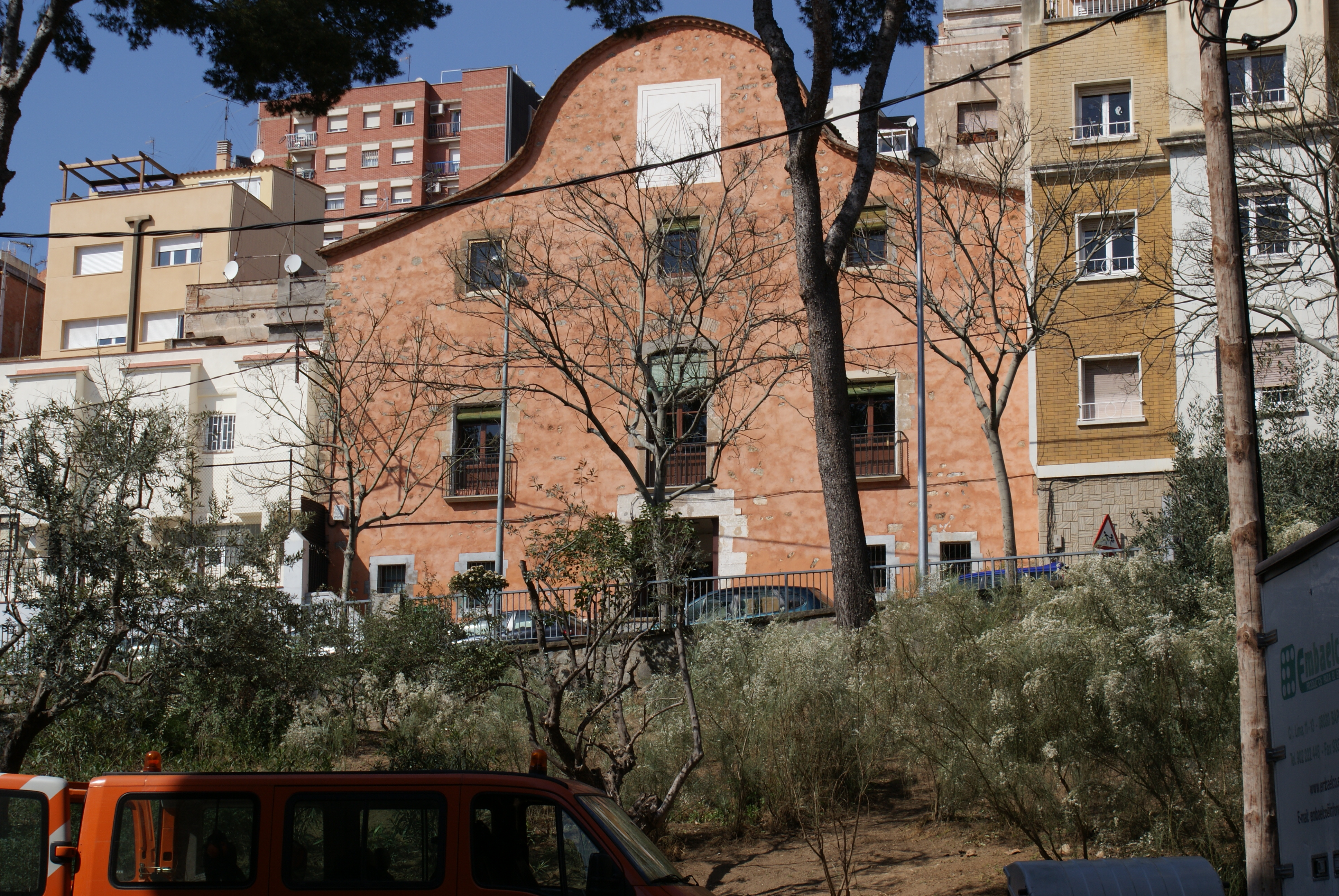 Masia de 1674 en les propietats de Josep Pascual i Santpere, al qui se li concedí el 1794 el títol de Baró de Sant Lluís, ambaixador de l'Estat Espanyol a Suïssa, i que dona nom al barri de Can Baró